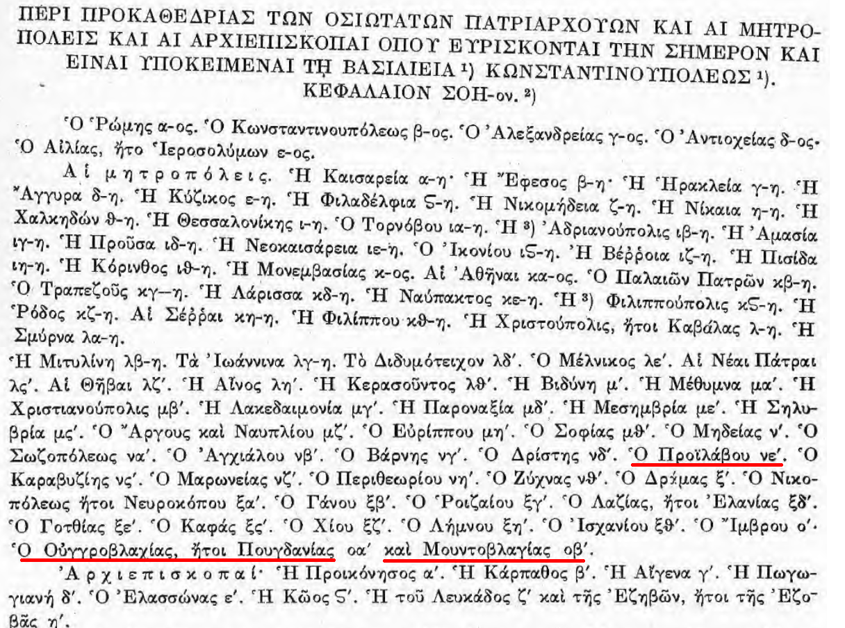 Fişierul conţine lista (în limba greacă) cu Mitropoliile şi Arhiepiscopiile aflate în subordinea Patriarhiei Ecumenice, aşa cum apar în Pravila cea Mare din 1652. Sunt subliniate cele trei Mitropolii de pe teritoriul României (Proilaviei - locull 55, Ungro-Vlahiei - locul 71 şi Moldovei - locul 72) Lista este extrasă din lucrea apărută sub egida Academiei Române, în 1962 Fişierul poate fi utilizat fără restricţii având în vedere vechimea sa